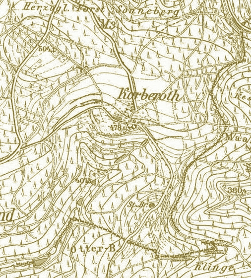 Kartenausschnitt zur Wüstung Korberoth im Landkreis Sonneberg.